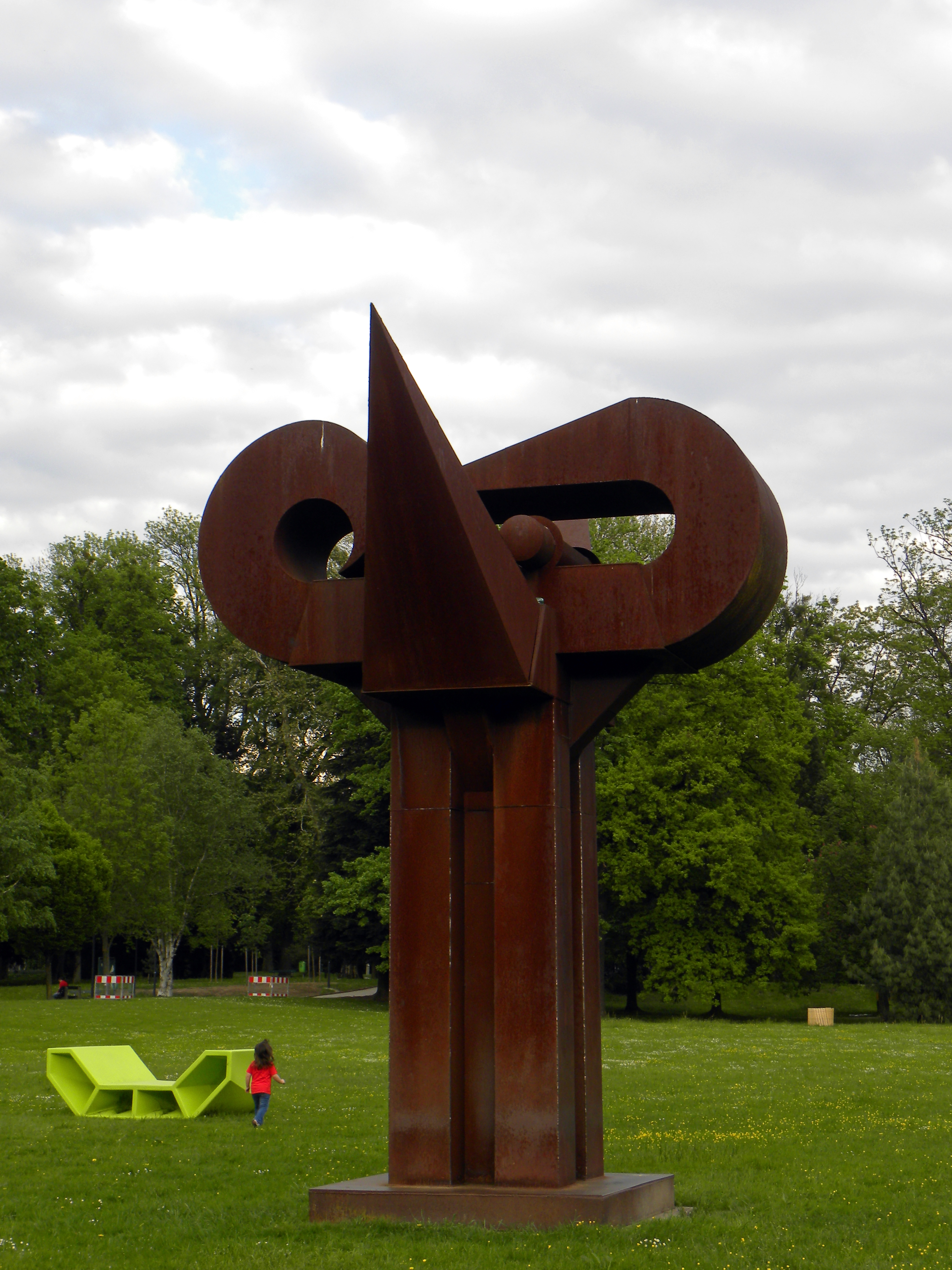 Universitätspark: Metallobjekt Gigant von Makoto Miura